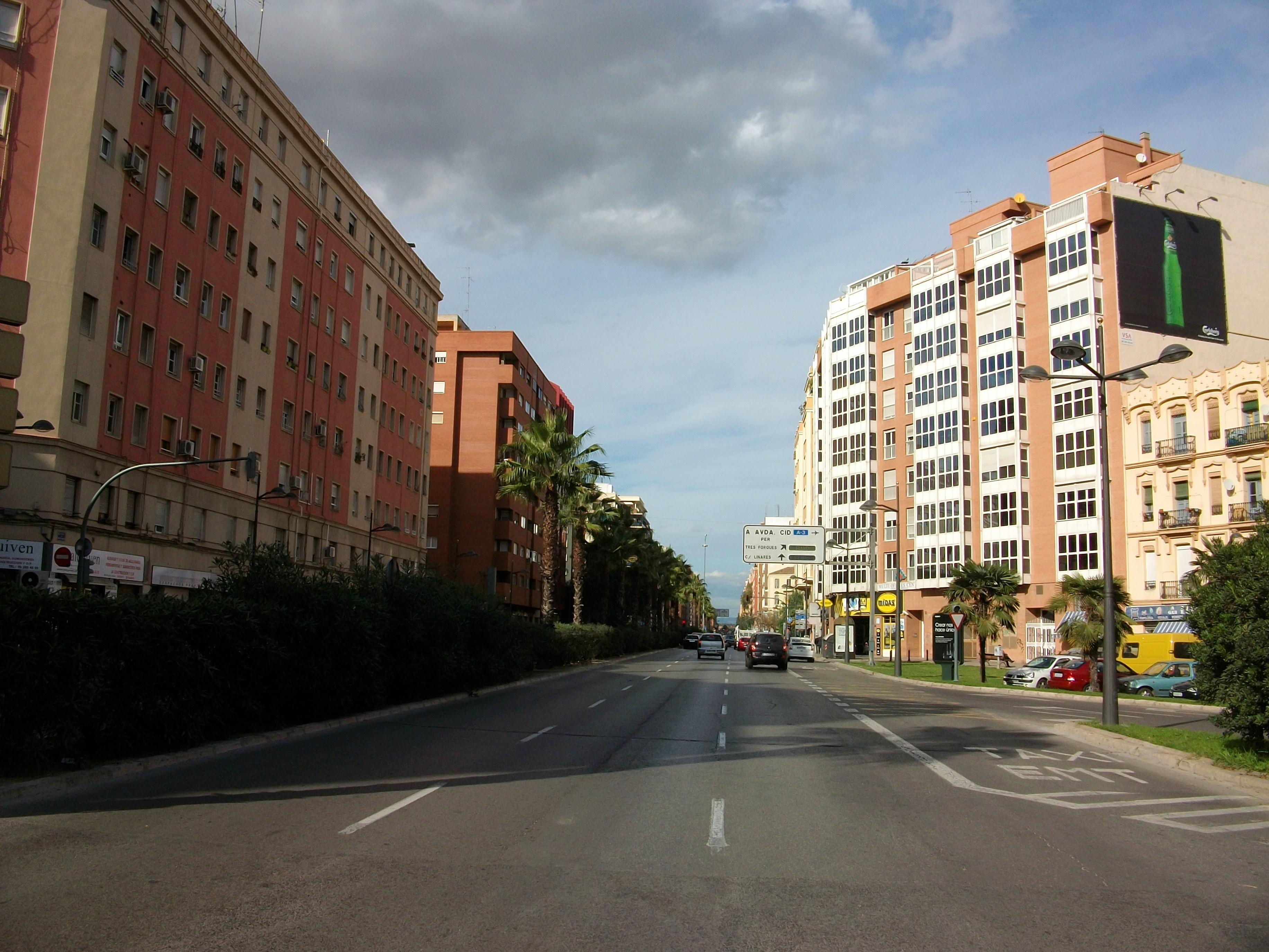 Inici de l'avinguda de Pérez Galdós de València.